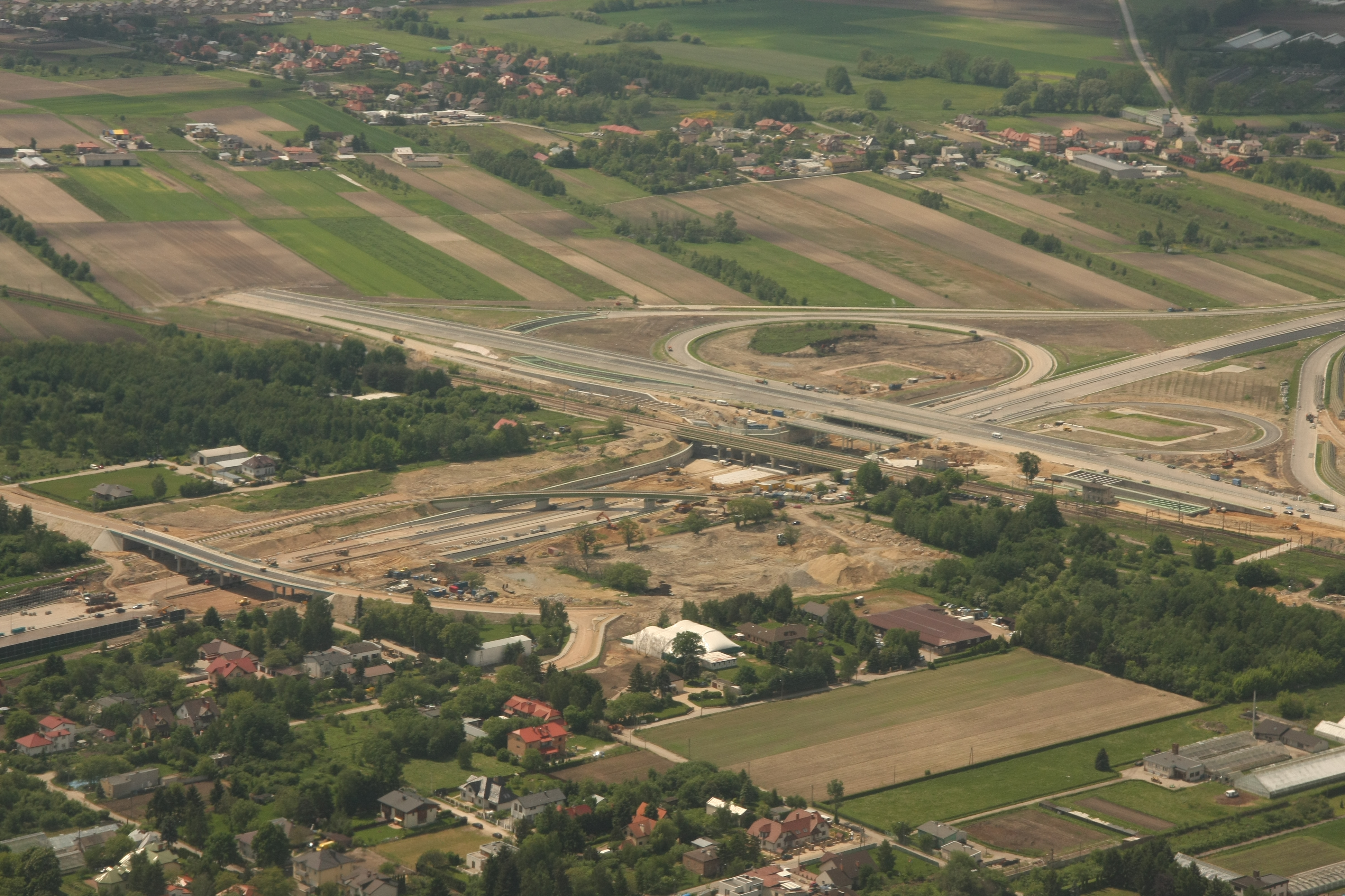 Budowa węzła "Lotnisko" na drodze ekspresowej S2 w Warszawie